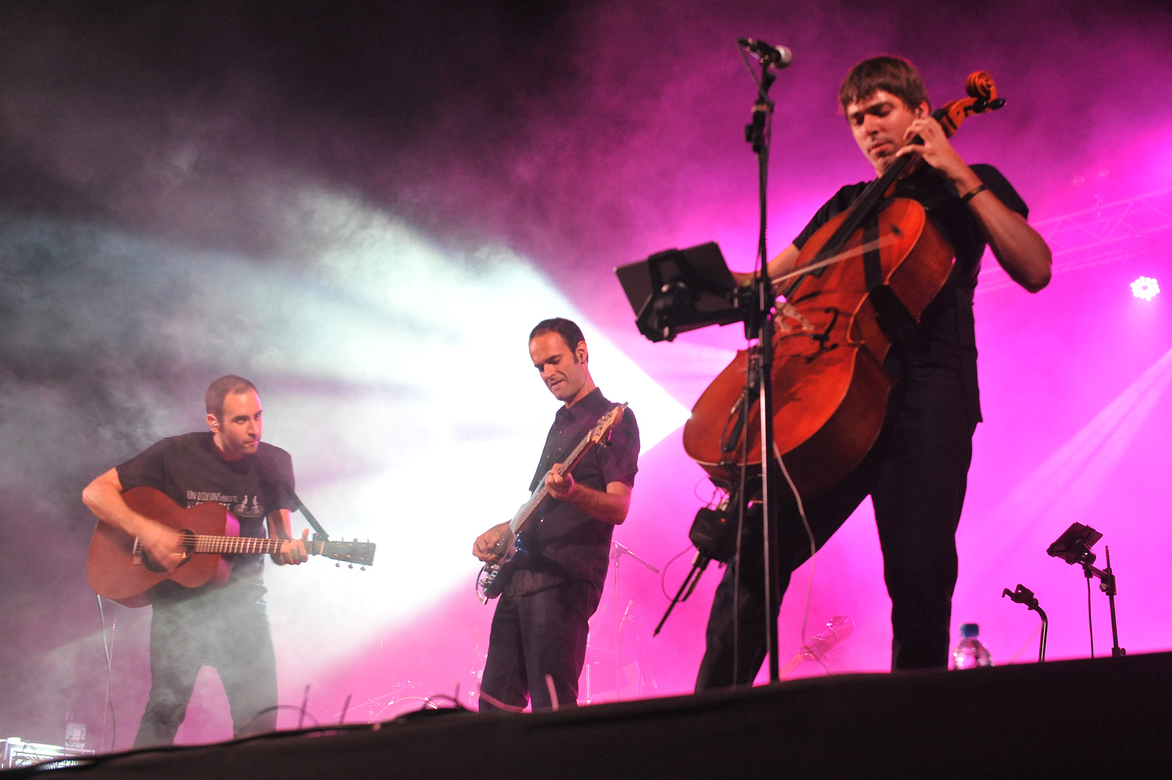 Concert de Blaumut a Esplugues de Llobregat, 20 de setembre 2014.